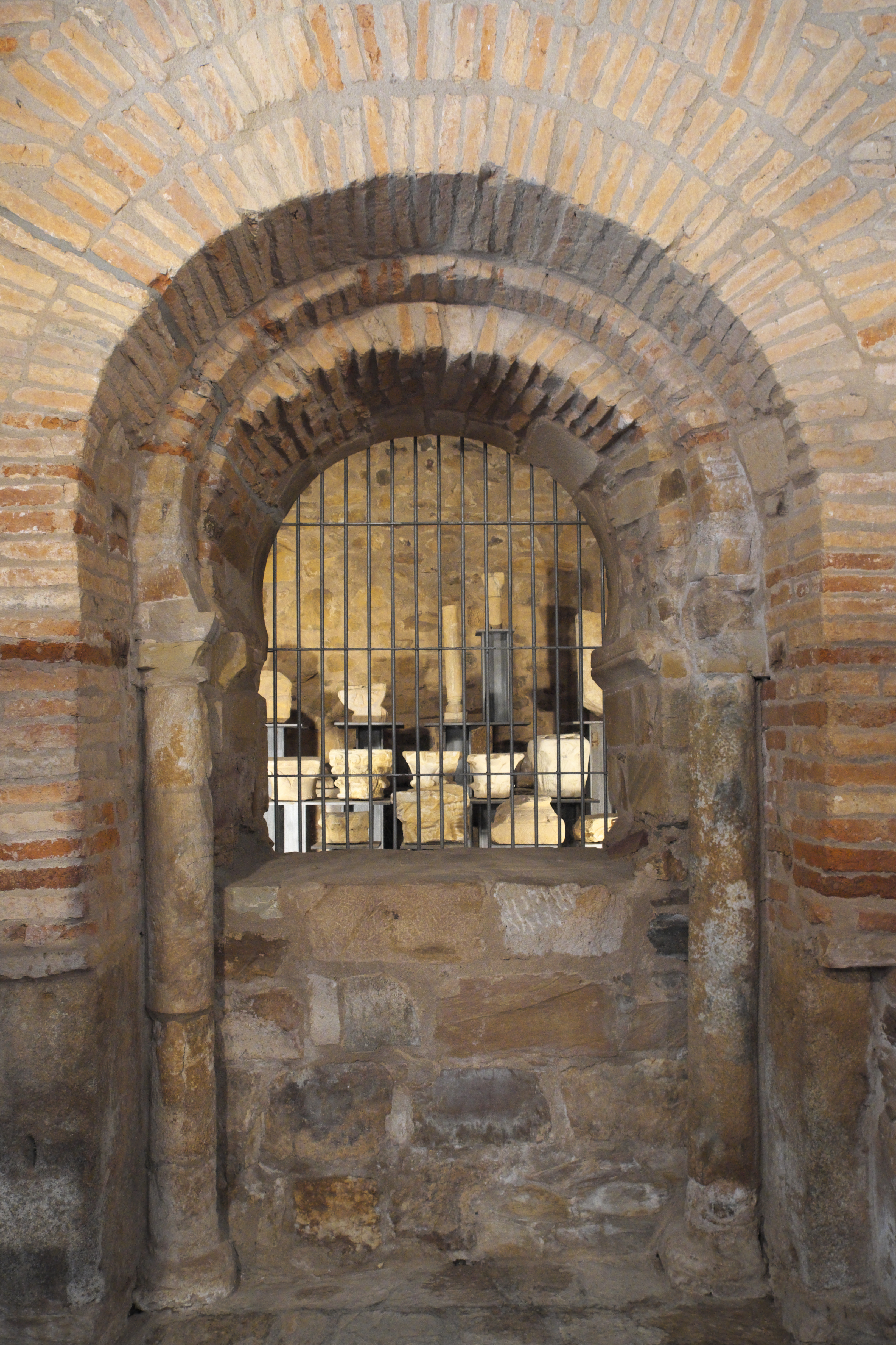 Katholische Pfarrkirche Santa María in Tábara in der Provinz Zamora in Kastilien und León (Spanien)